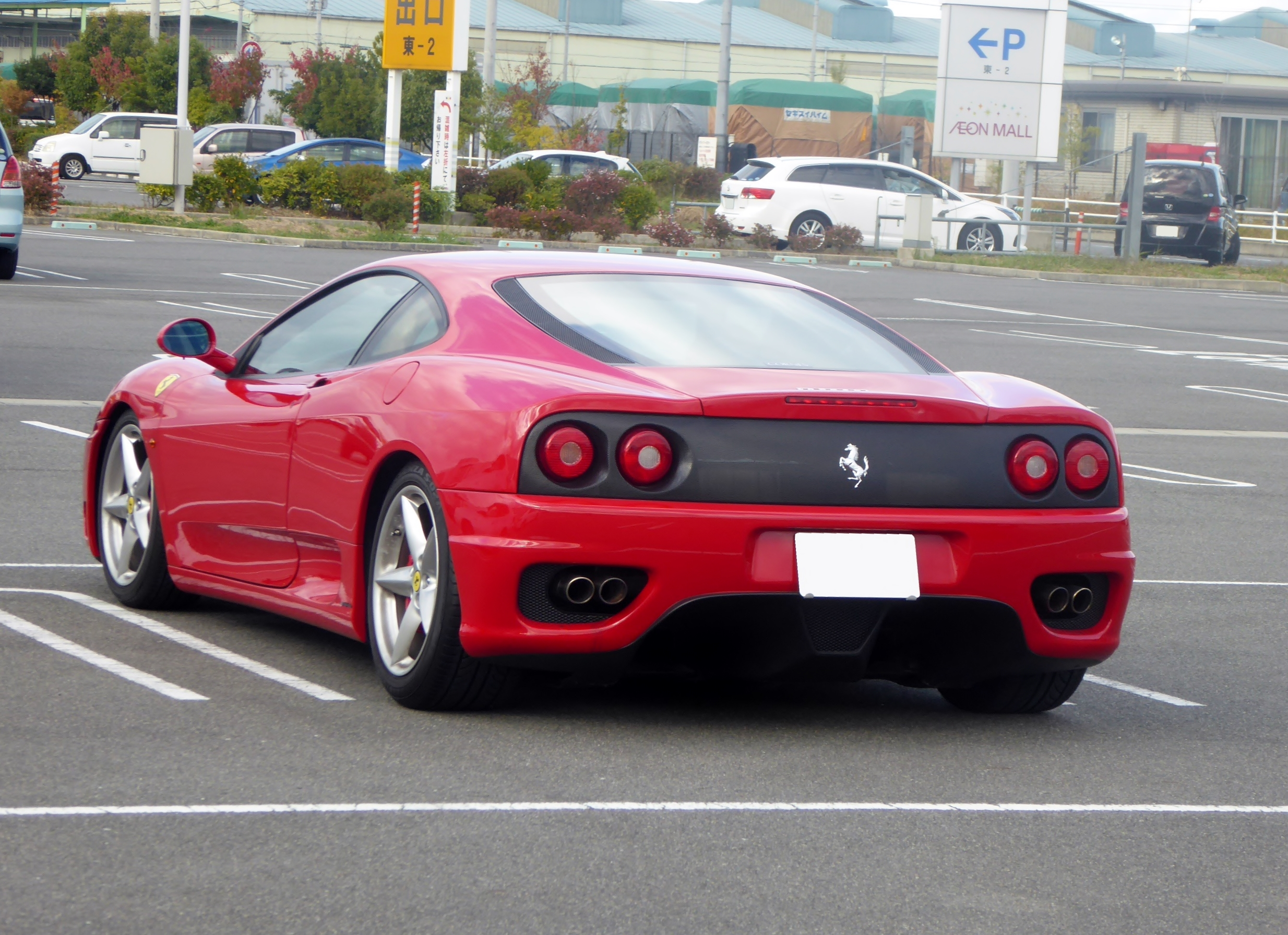 GH-F360型フェラーリ・360モデナをリアから撮影。